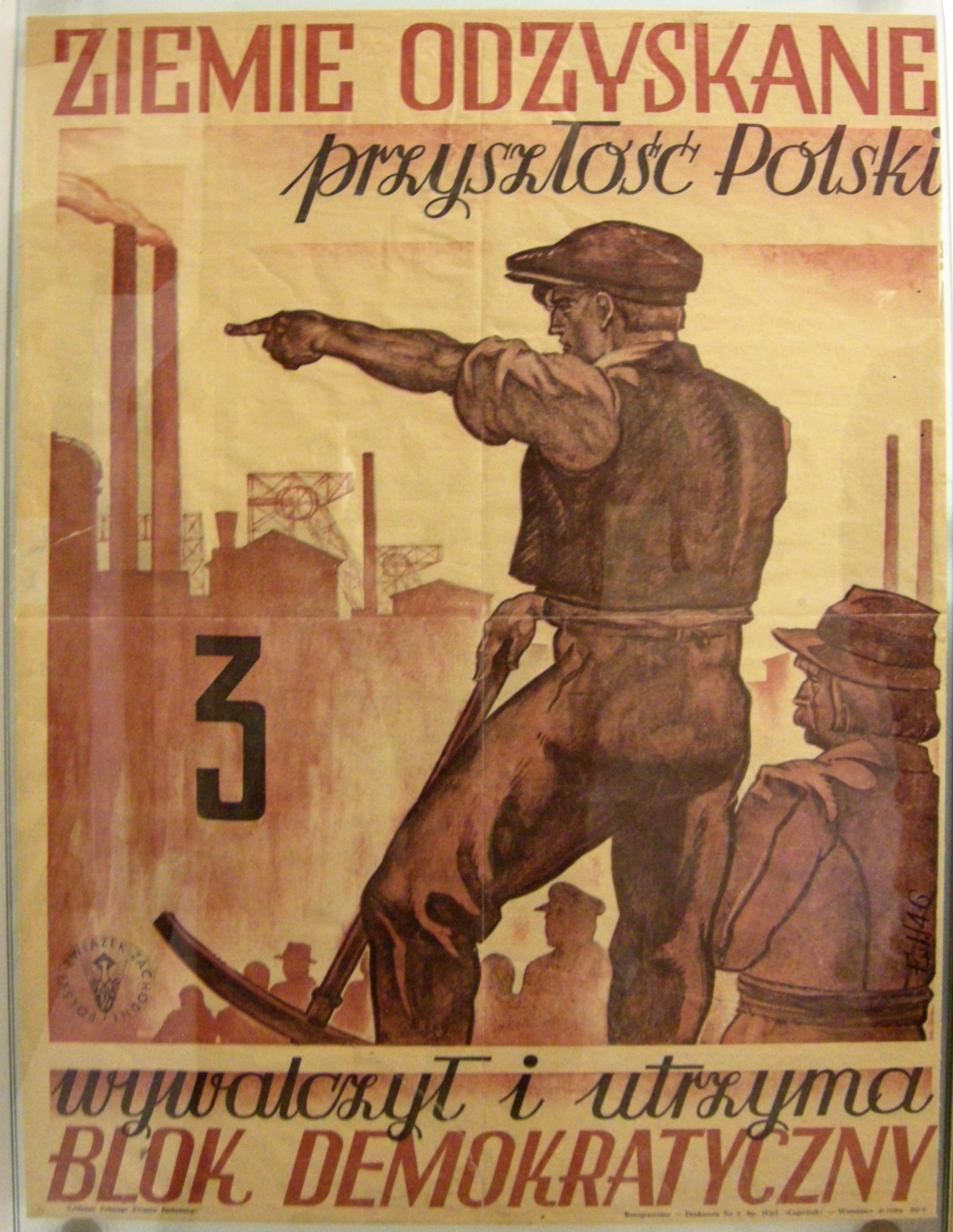 Muzeum Poznańskiego Czerwca 1956. Eksponaty.